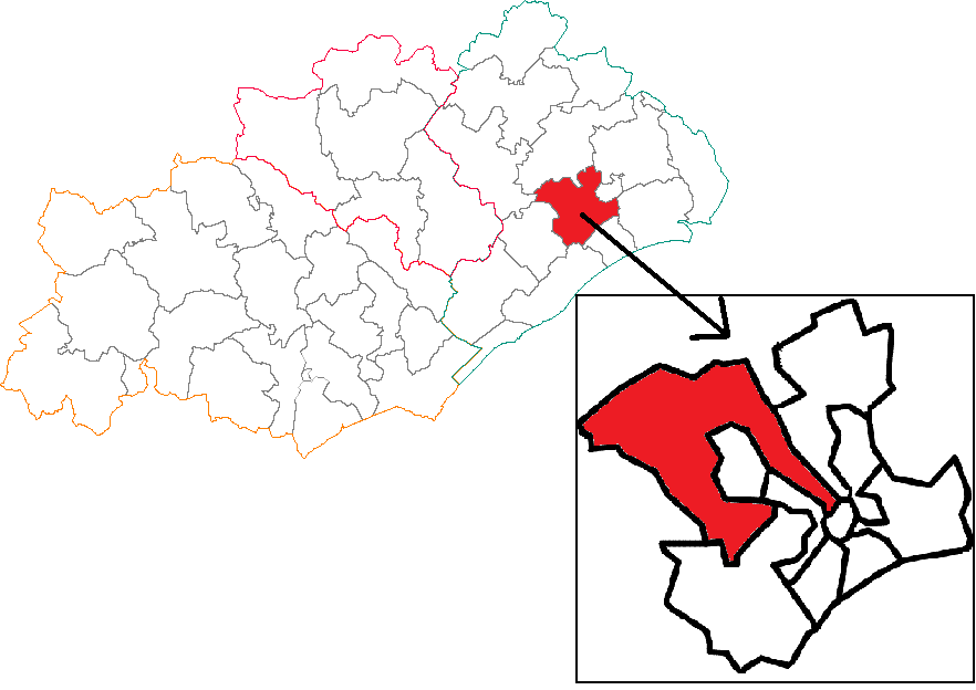 Situation du canton dans le département de l'Hérault.